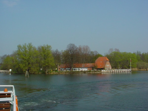 Die ehemalige Zollstation Rothenhusen, heute Gasthaus Fährhaus Rothenhusen, auf einer Insel im Ratzeburger See in Schleswig-Holstein. Baulicher Zustand vor Umbauten und Renovierung.